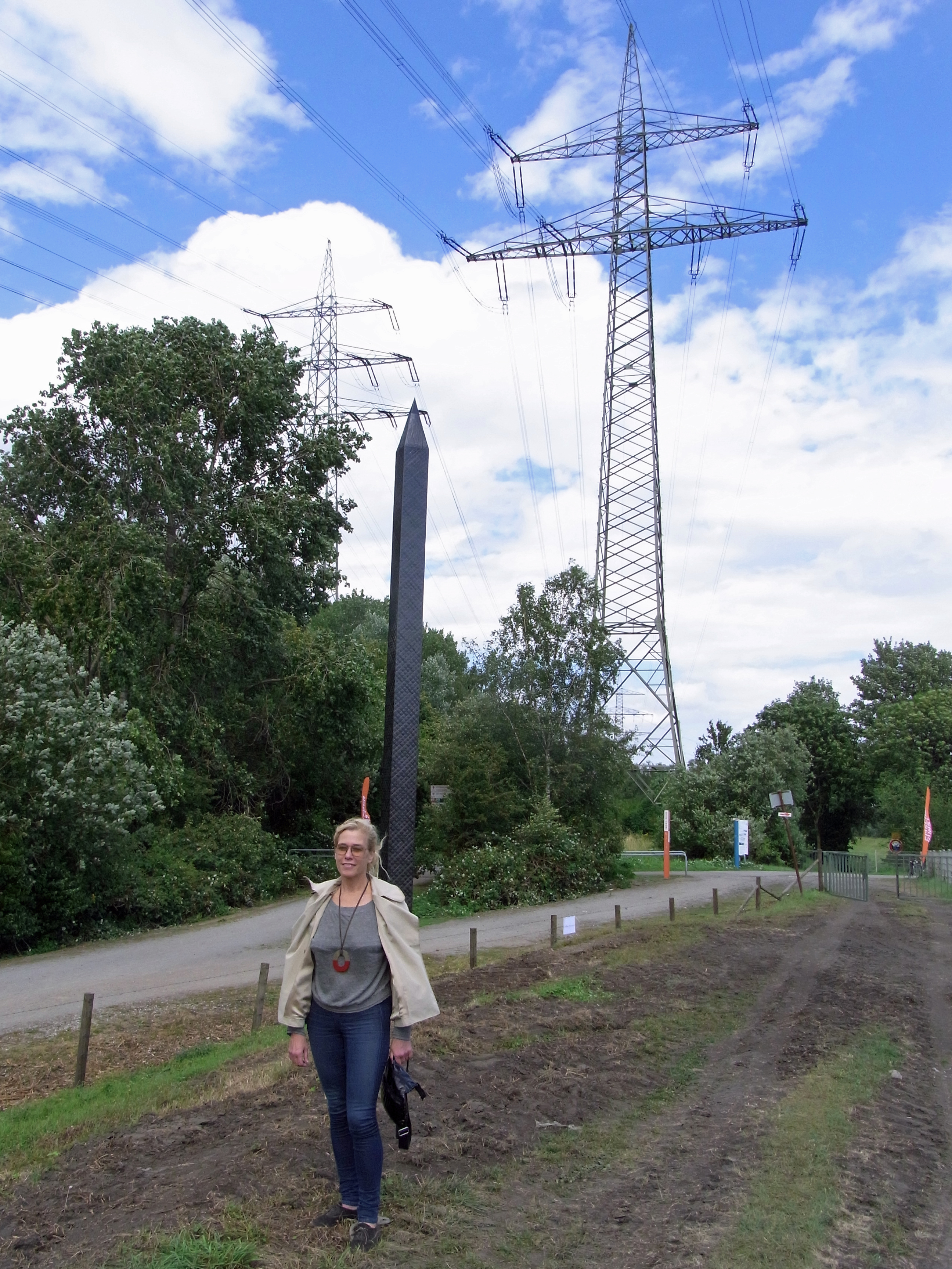 Rita McBride am Carbon Obelisk, dahinter rechts Freileitungsmast (Bl. 4164 M3)